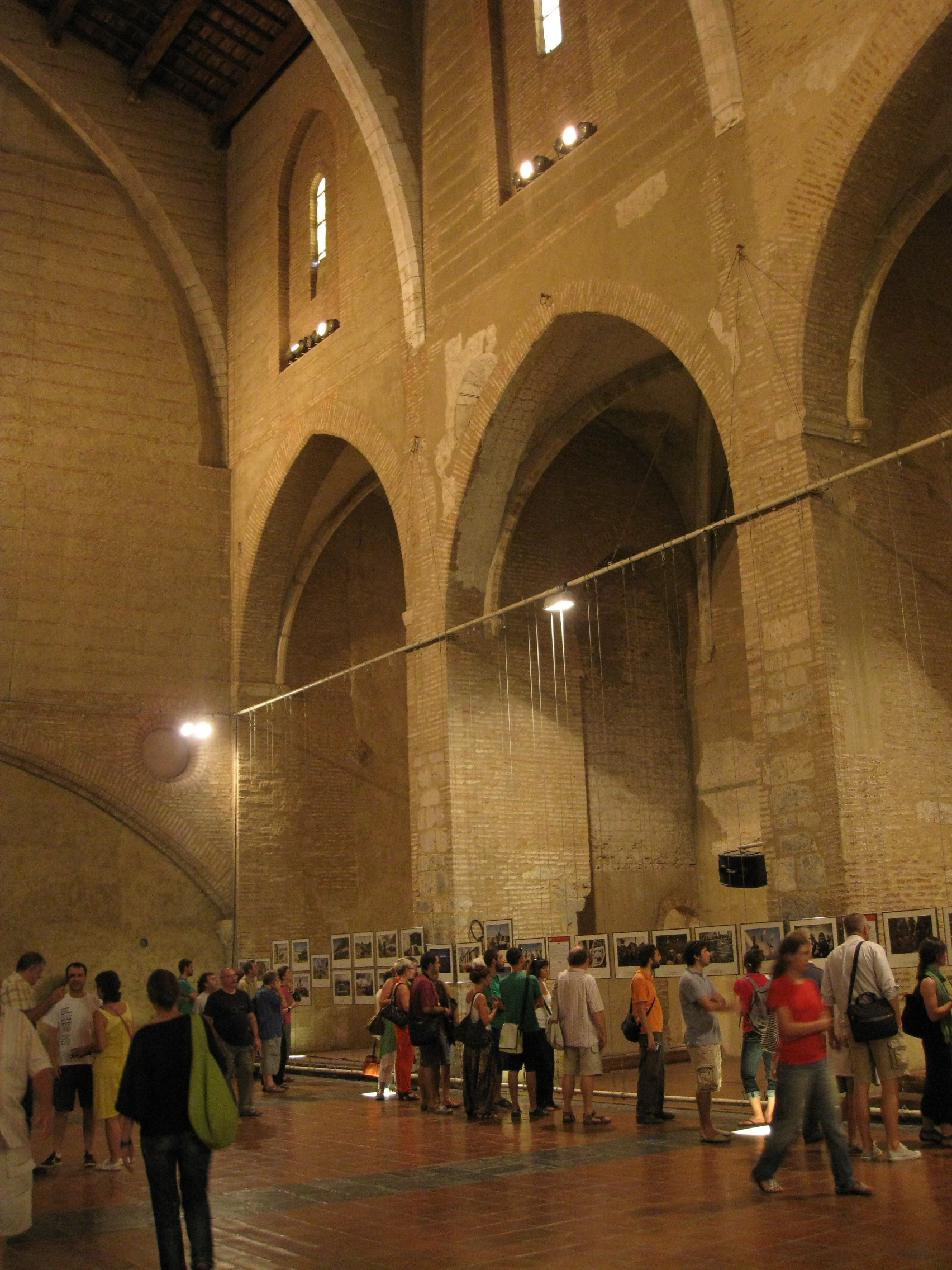 Església de Sant Domènec (Perpinyà), exposició de fotos durant el certamen Visa Pour l'Image a la nau gòtica del convent .